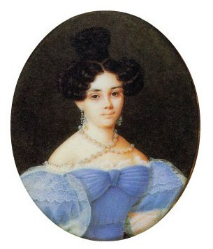 Ольга Александровна Булгакова (1814-1865), дочь А.Я.Булгакова, жена князя А.С.Долгорукого